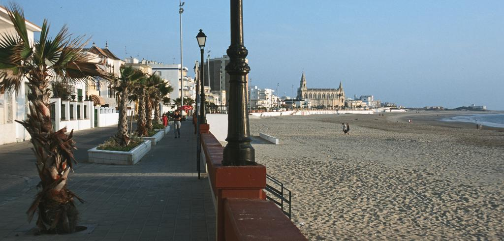 Chipiona Atlantikstrand, Richtung Süden mit dem Kloster Nuestra Señora de la Regla